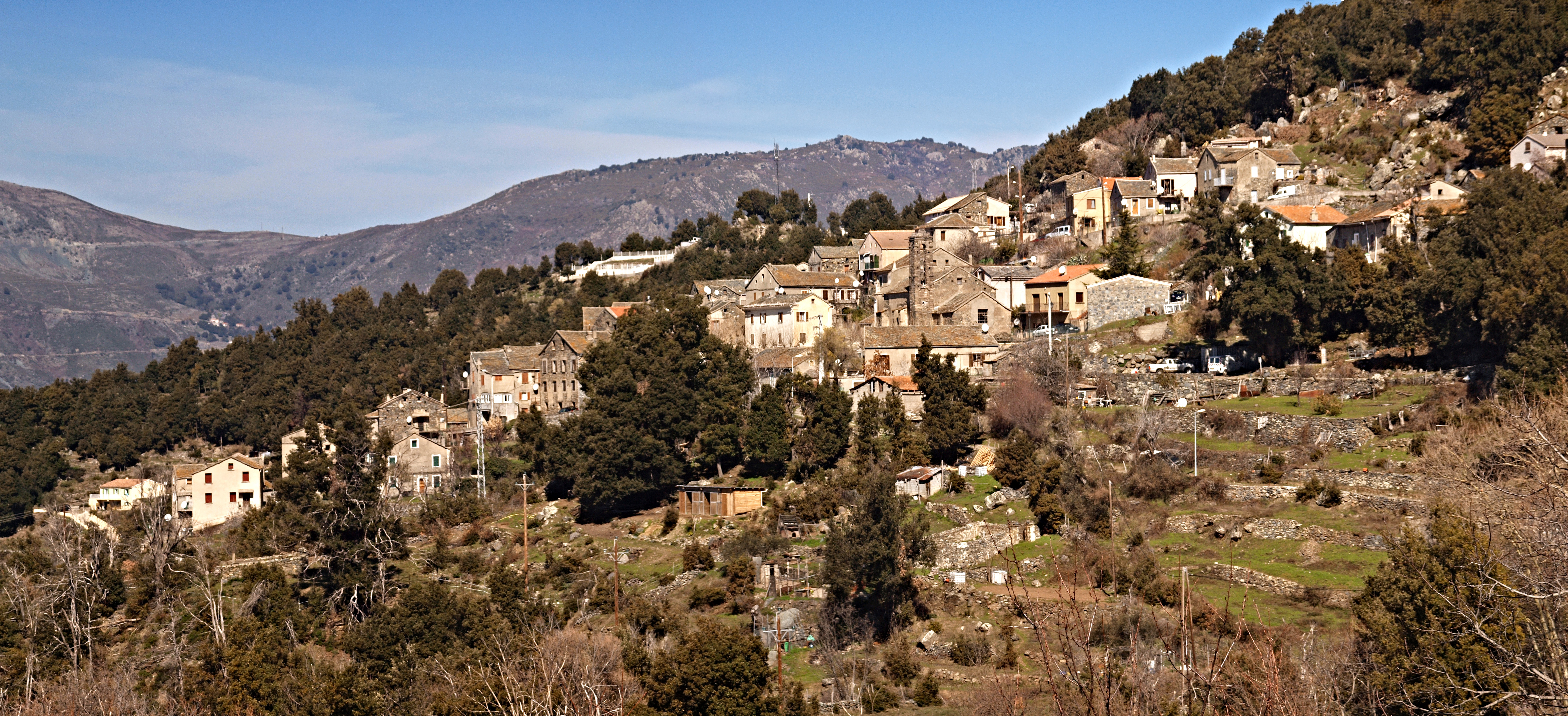 Bisinchi, Rustinu (Corse) - Panorama du village Corsu: Bisinchi, Rustinu (Corsica) - Affacchereccia di u paese